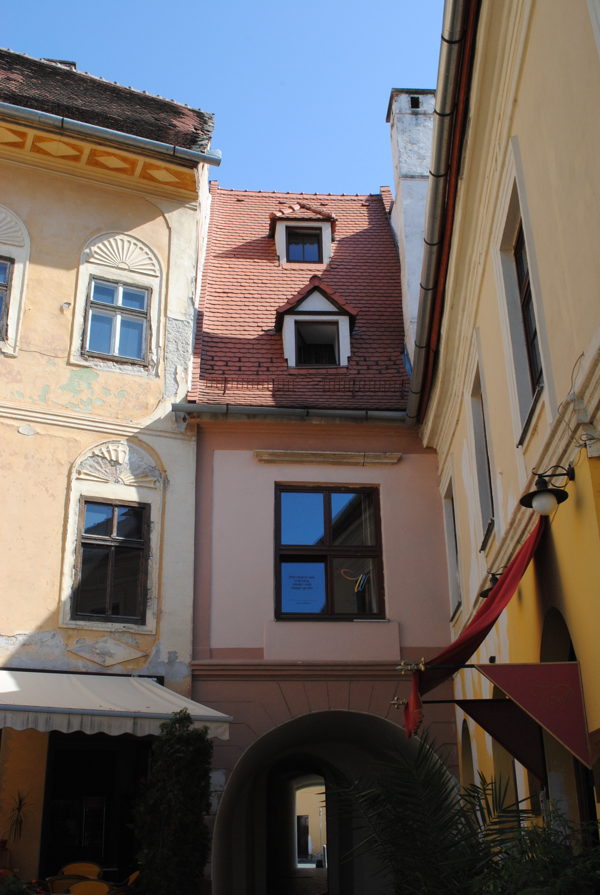 Casă (în curte fragment din incinta II), sec. XV - XVI, sf. sec. XVIII